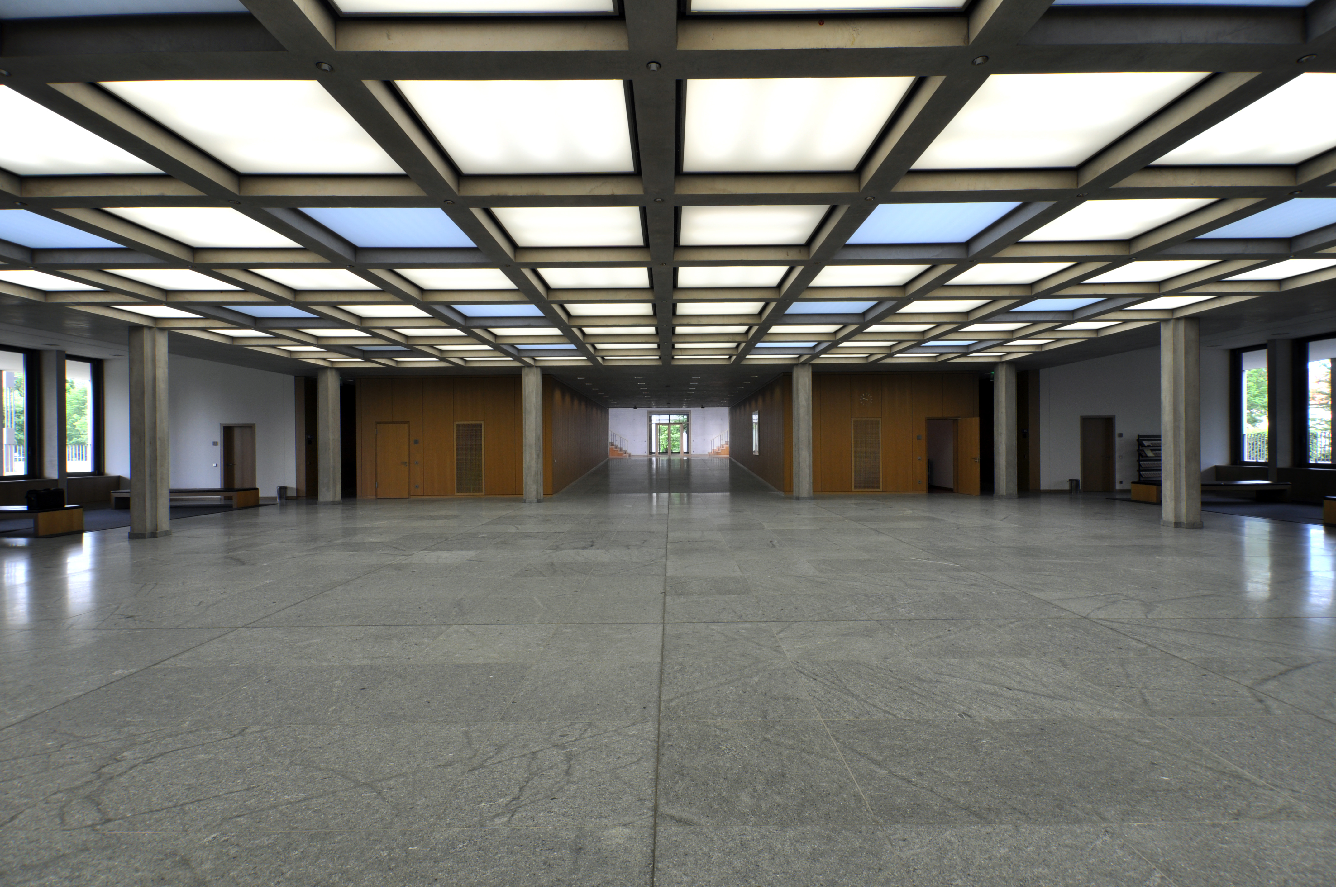 Bundesarbeitsgericht Erfurt